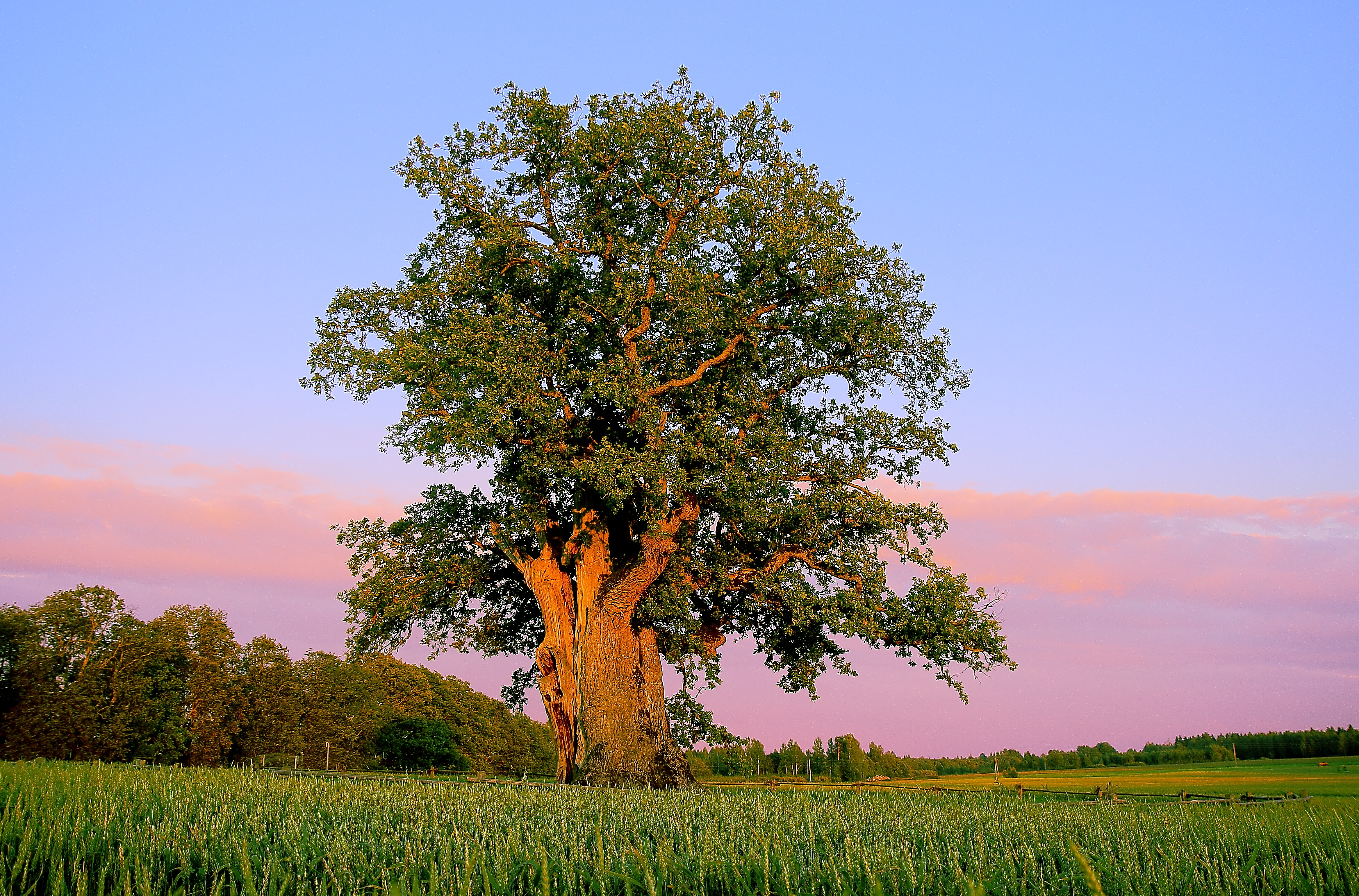 Kaņepju Svētozols - kulta vieta, Jērcēnu pagasts, Strenču novads